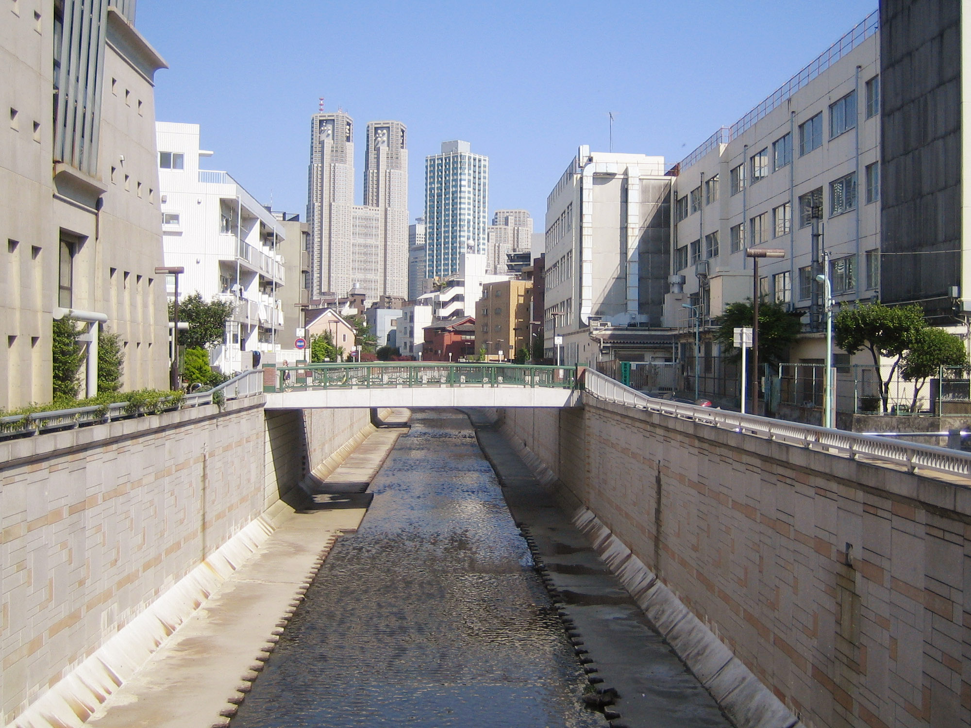 Kanda River (神田川 Kandagawa), at Nakano, Tokyo, Japan